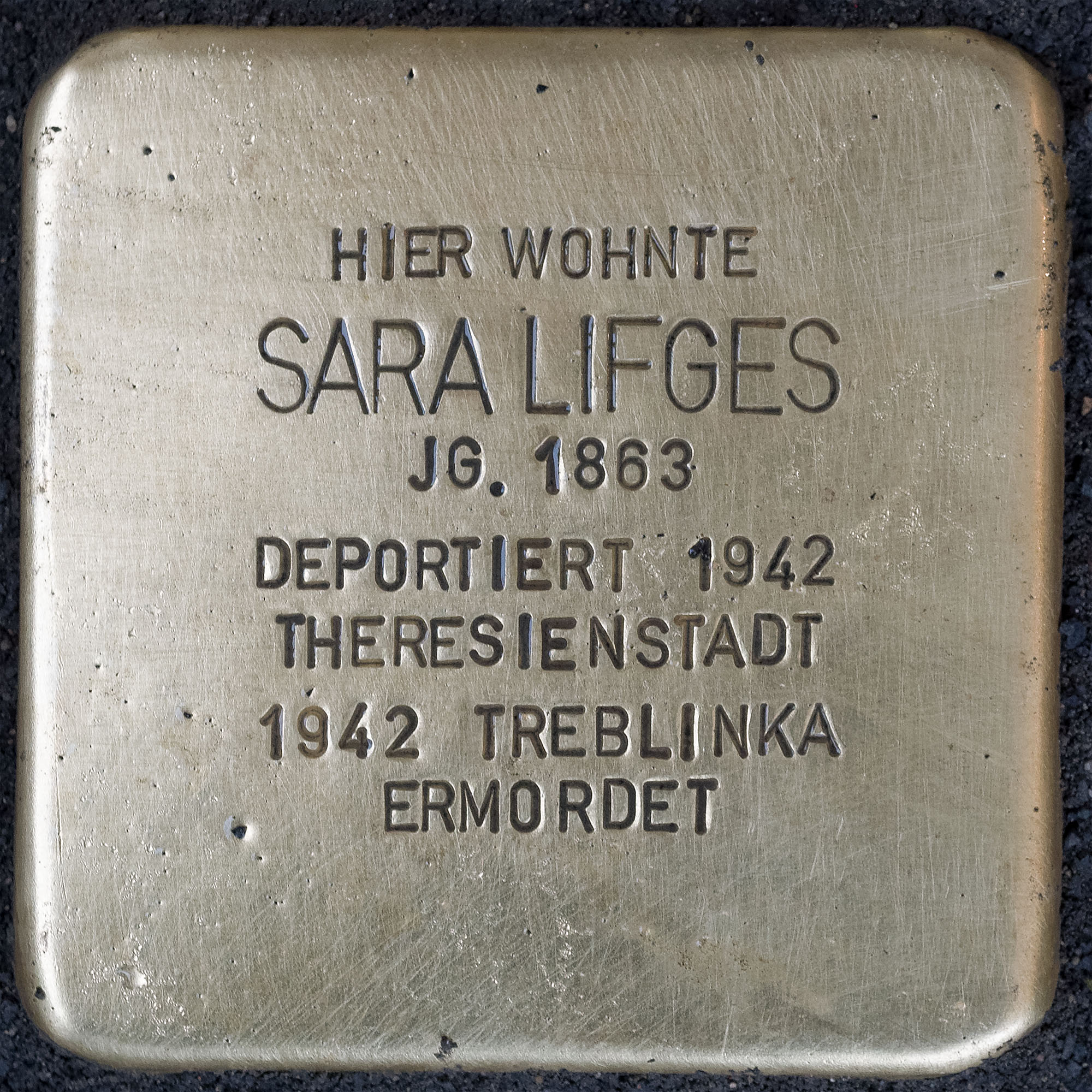 Stolpersteine Suechteln: Lifges, Sara